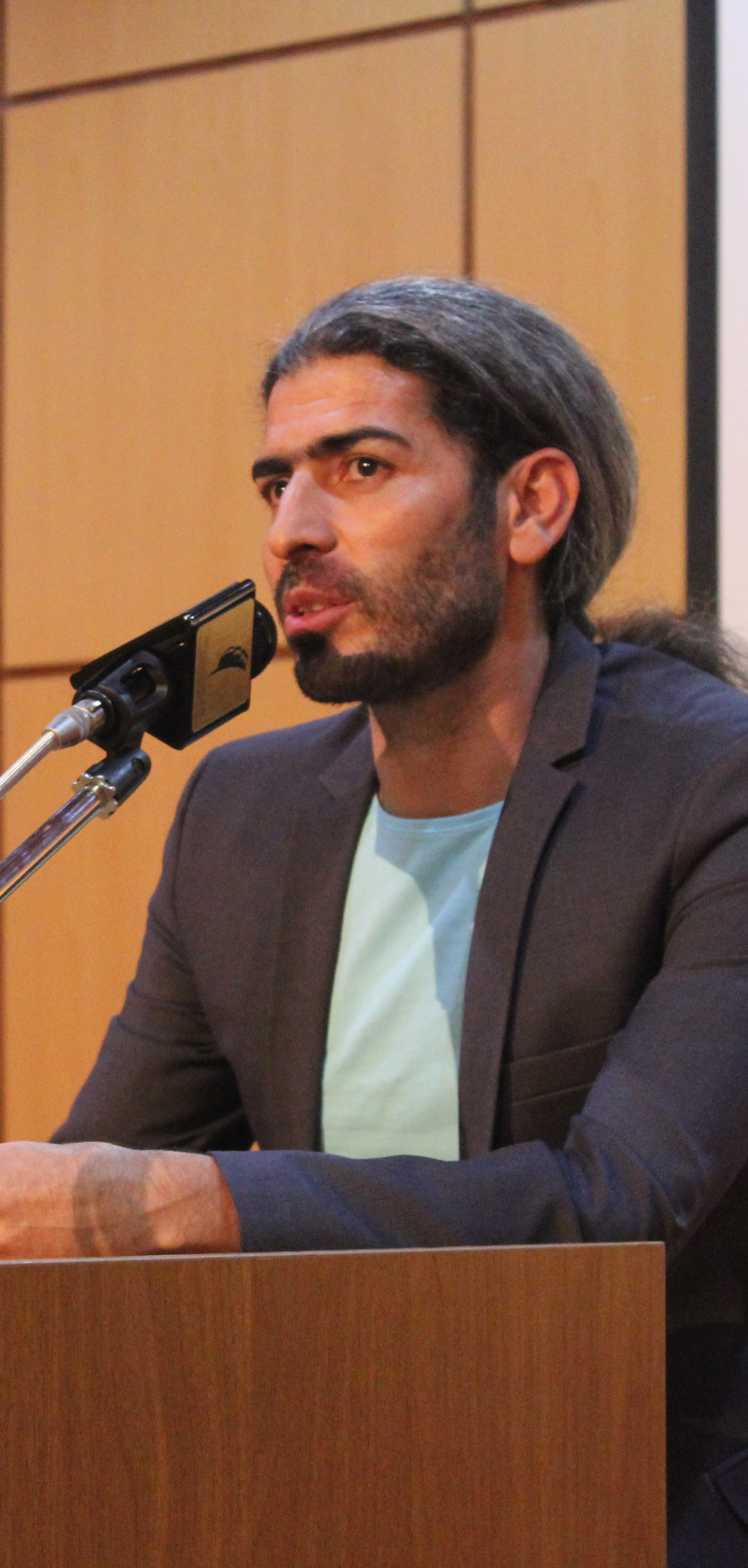 امیر ارجینی در کنگره سه نسل با ادبیات